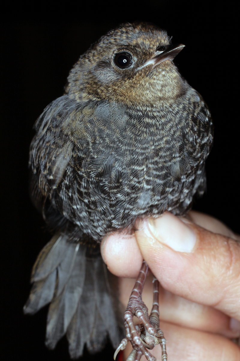 Juvie